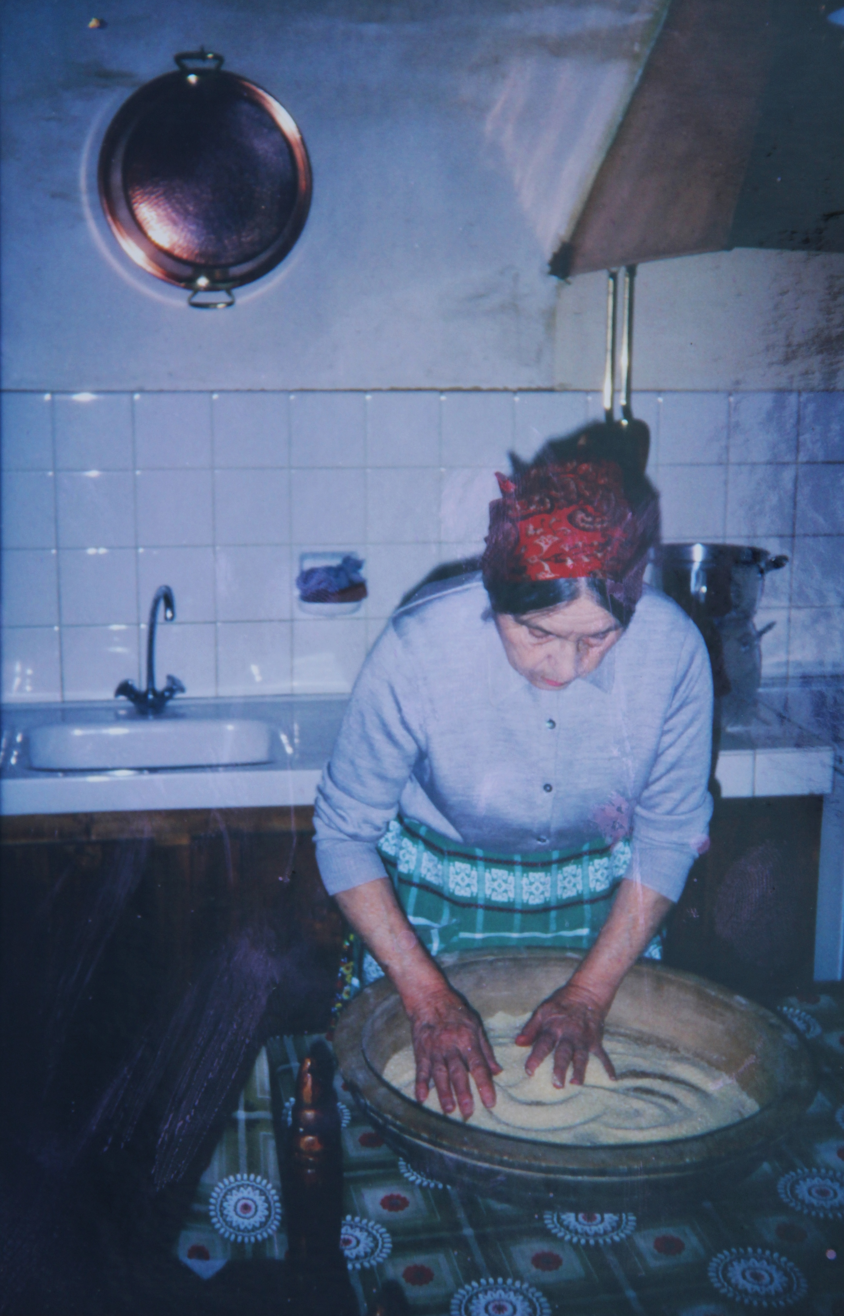 Grand mère pied noir roulant la semoule dans la guessa en noyer